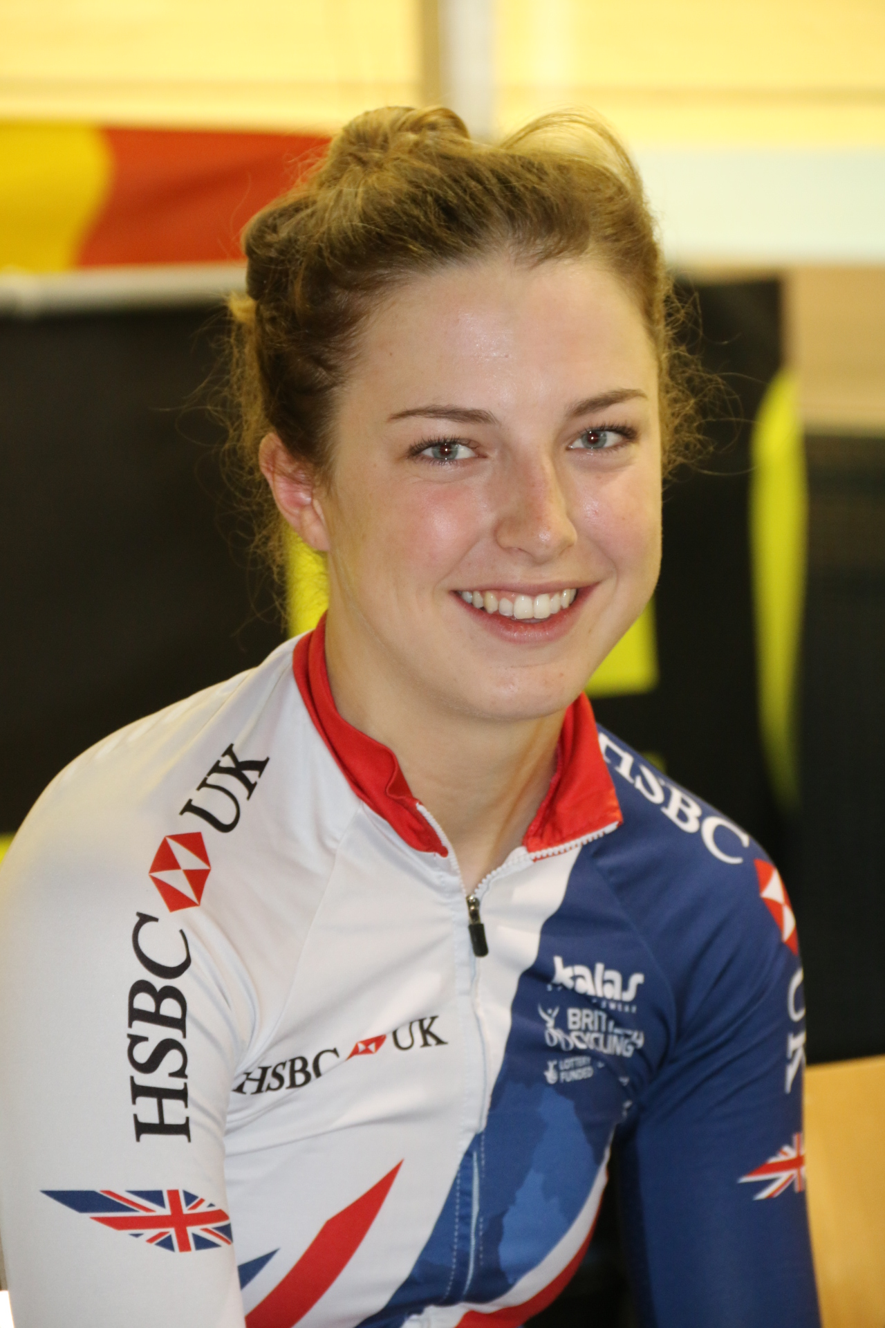 Manon Lloyd, britische Radsportlerin